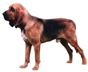 Chien de Saint-Hubert sur fond blanc